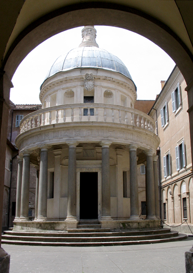 Tempietto, Donato Bramante, Roma, Italia, 1510Tempietto del Bramante (Rome).